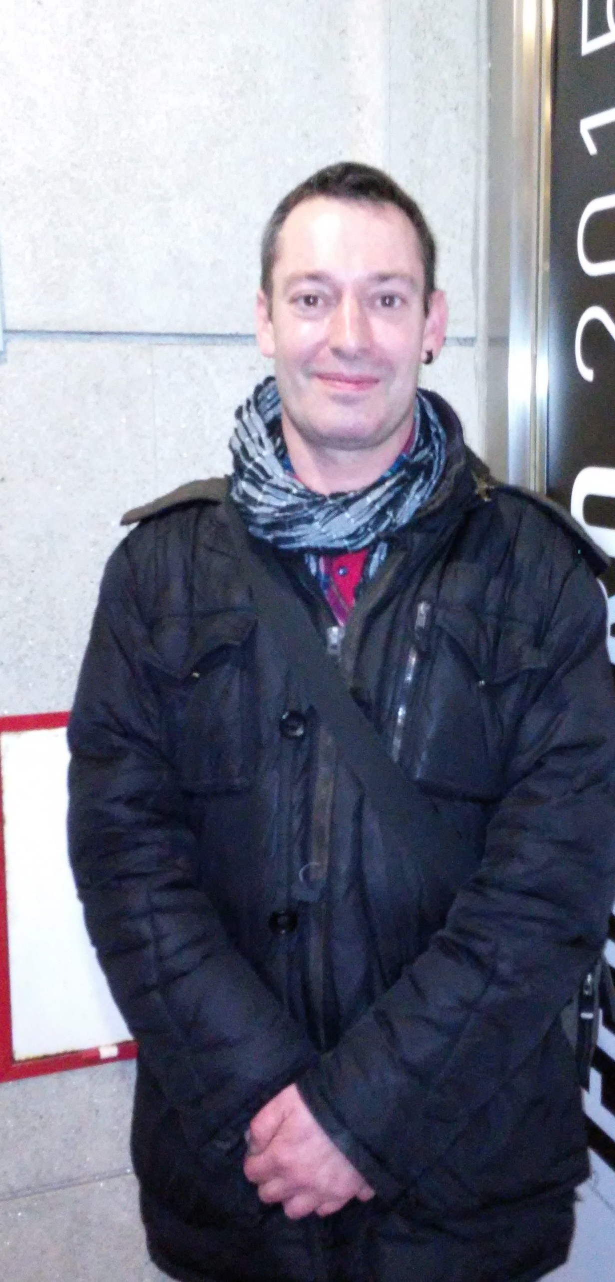 Foto de Pablo Díaz Carro na cidade da Coruña.